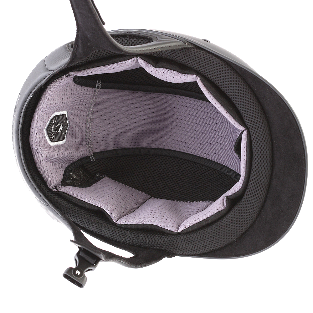 Wkładka kasku jeździeckie Samshield w wersji premium.